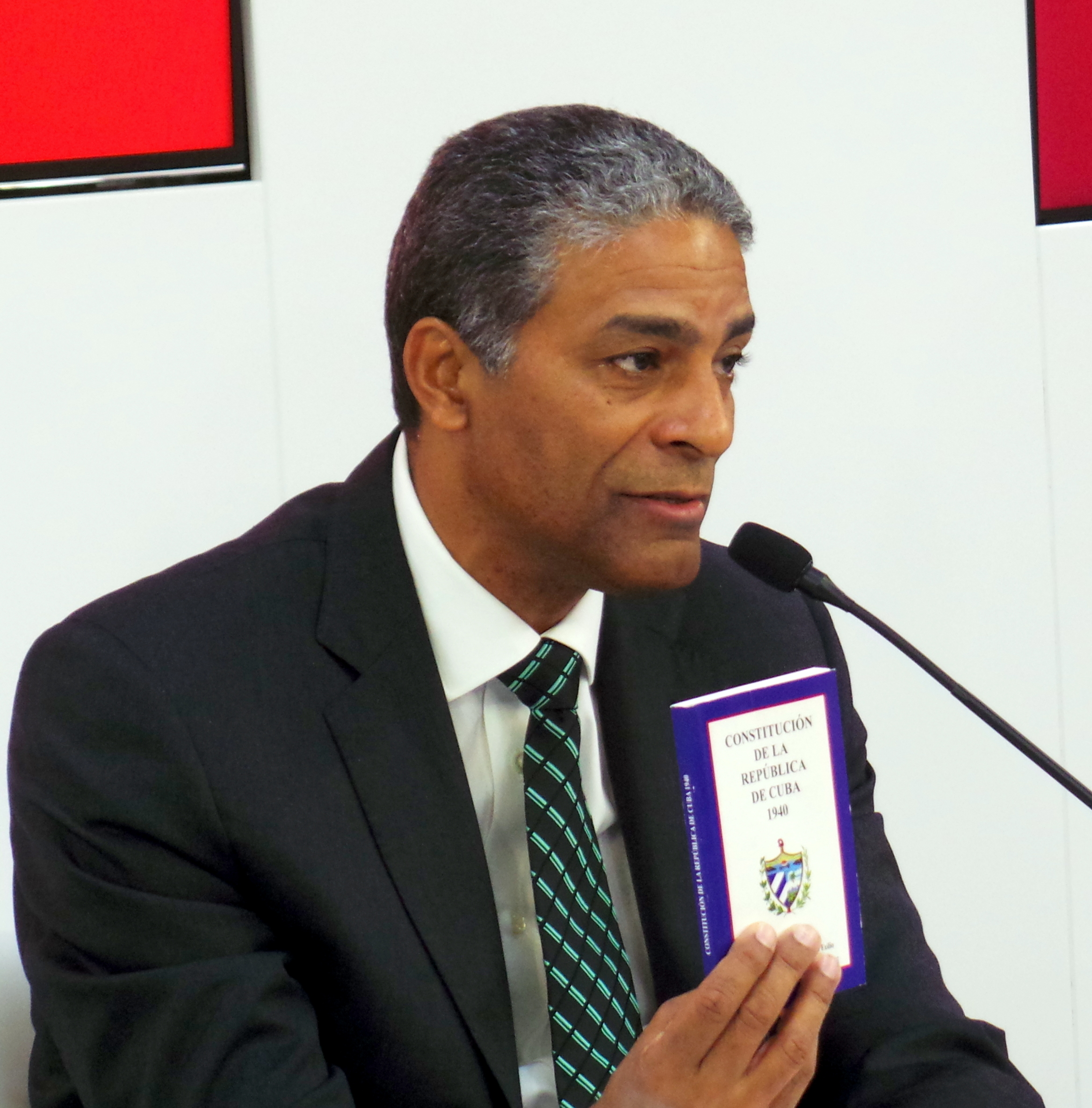 Conferencia del doctor Oscar Elías Biscet, que estuvo 11 años en prisión en Cuba por defender el derecho a vivir de los niños por nacer.